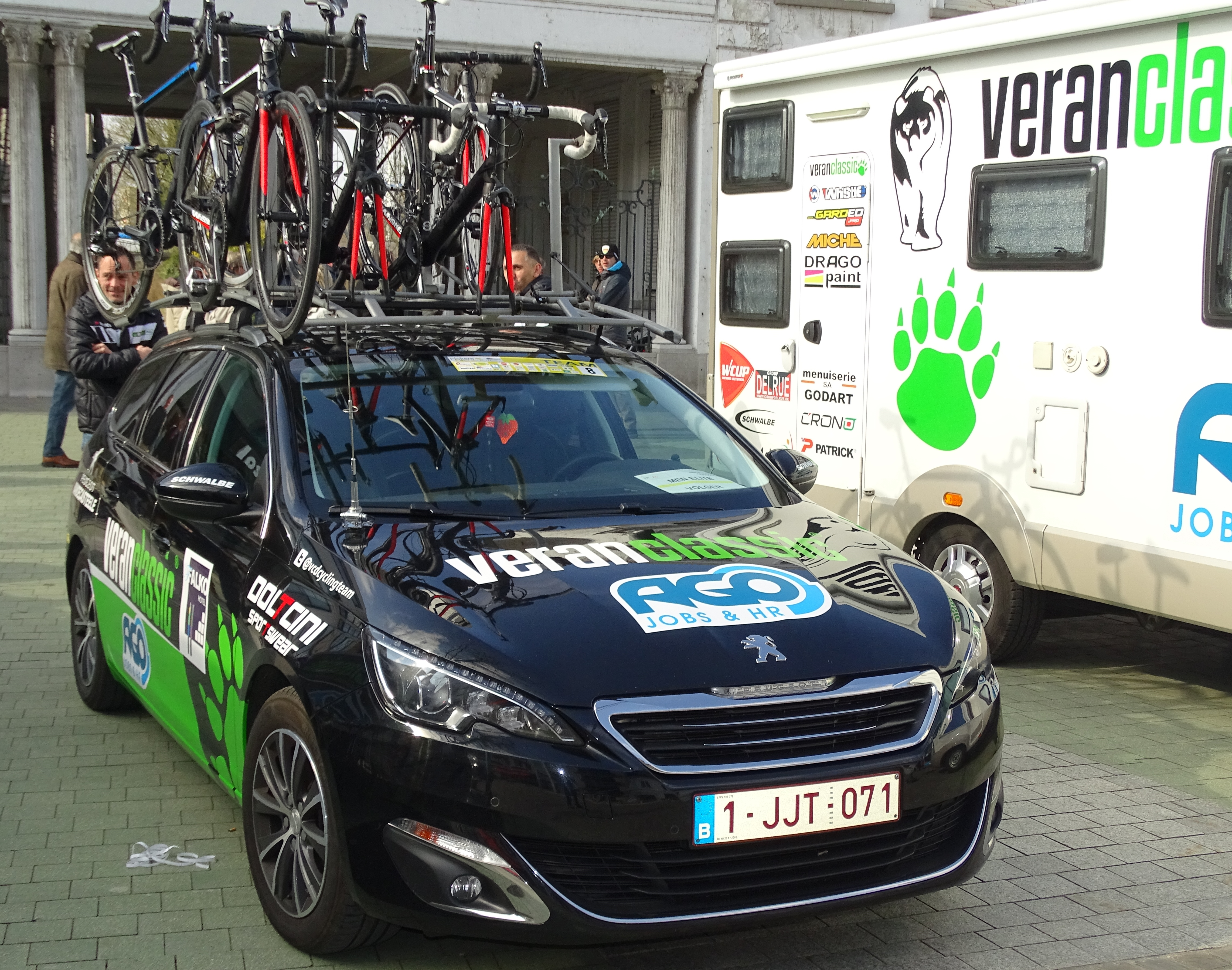 Reportage réalisé le mercredi 16 mars à l'occasion du départ de la Nokere Koerse 2016 à Deinze, Belgique.